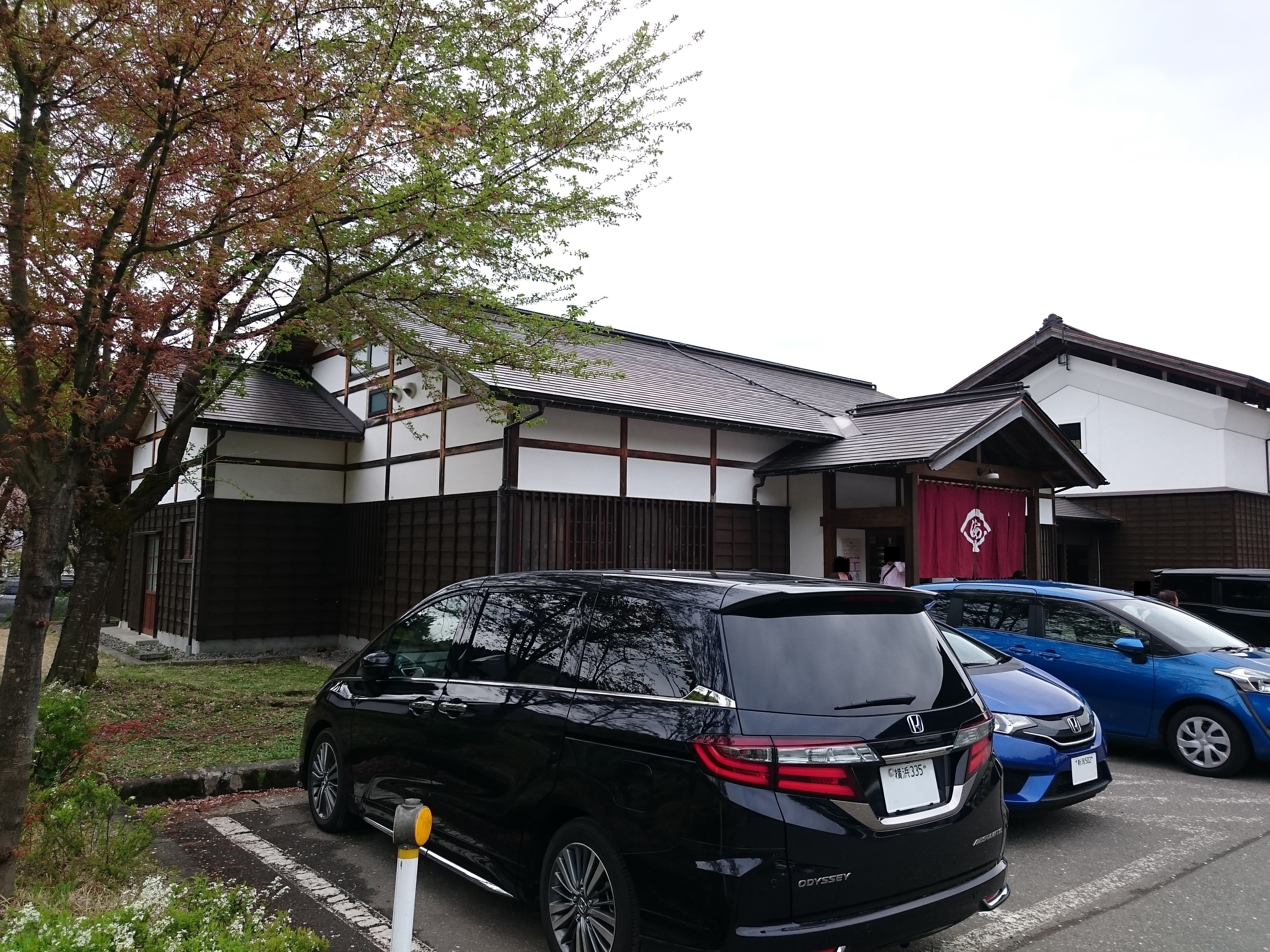 つつみや八蔵の外観